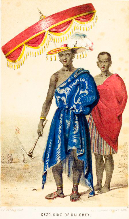 Gezo, King of Dahomey